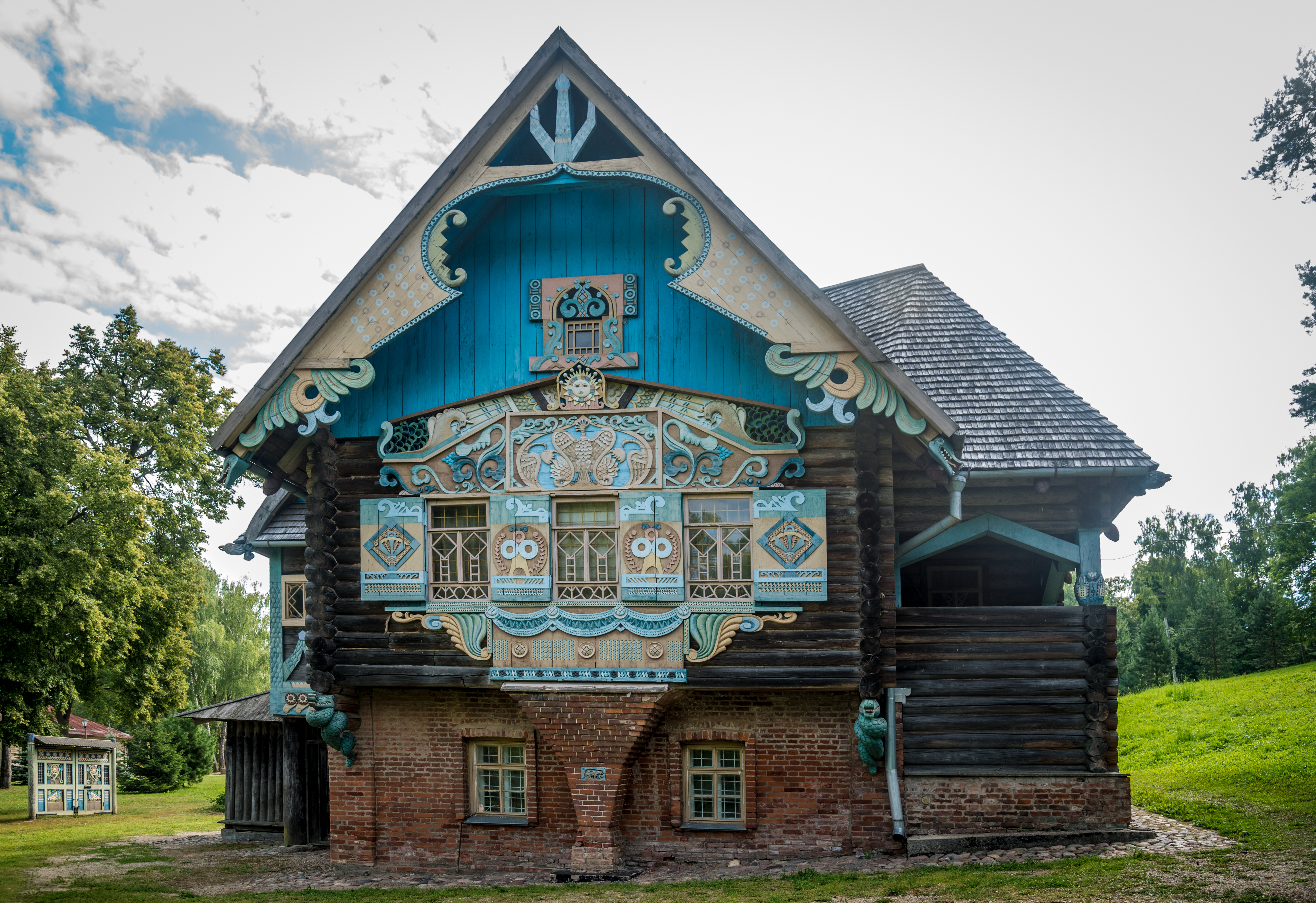 «Теремок»: с. Фленово, Талашкино, Смоленский район, Смоленская область